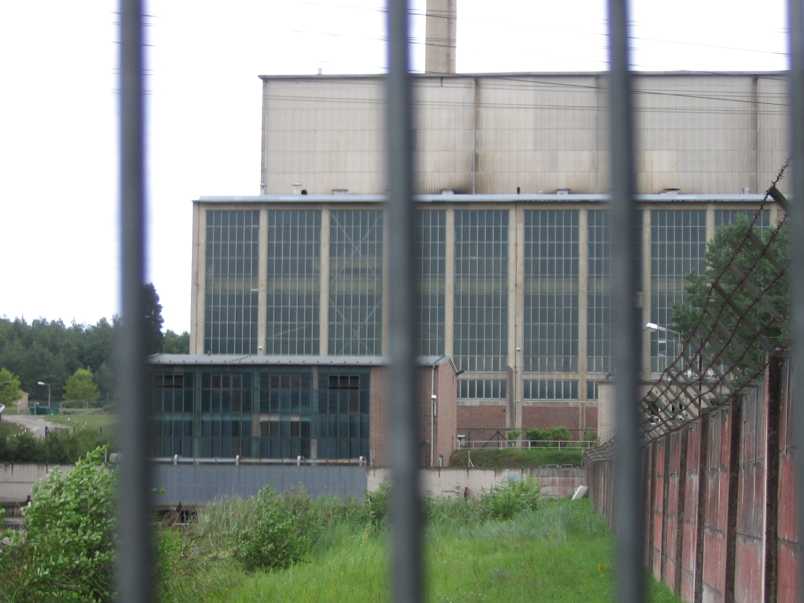 KKW Rheinsberg vom Zulauf des Nemitzsees